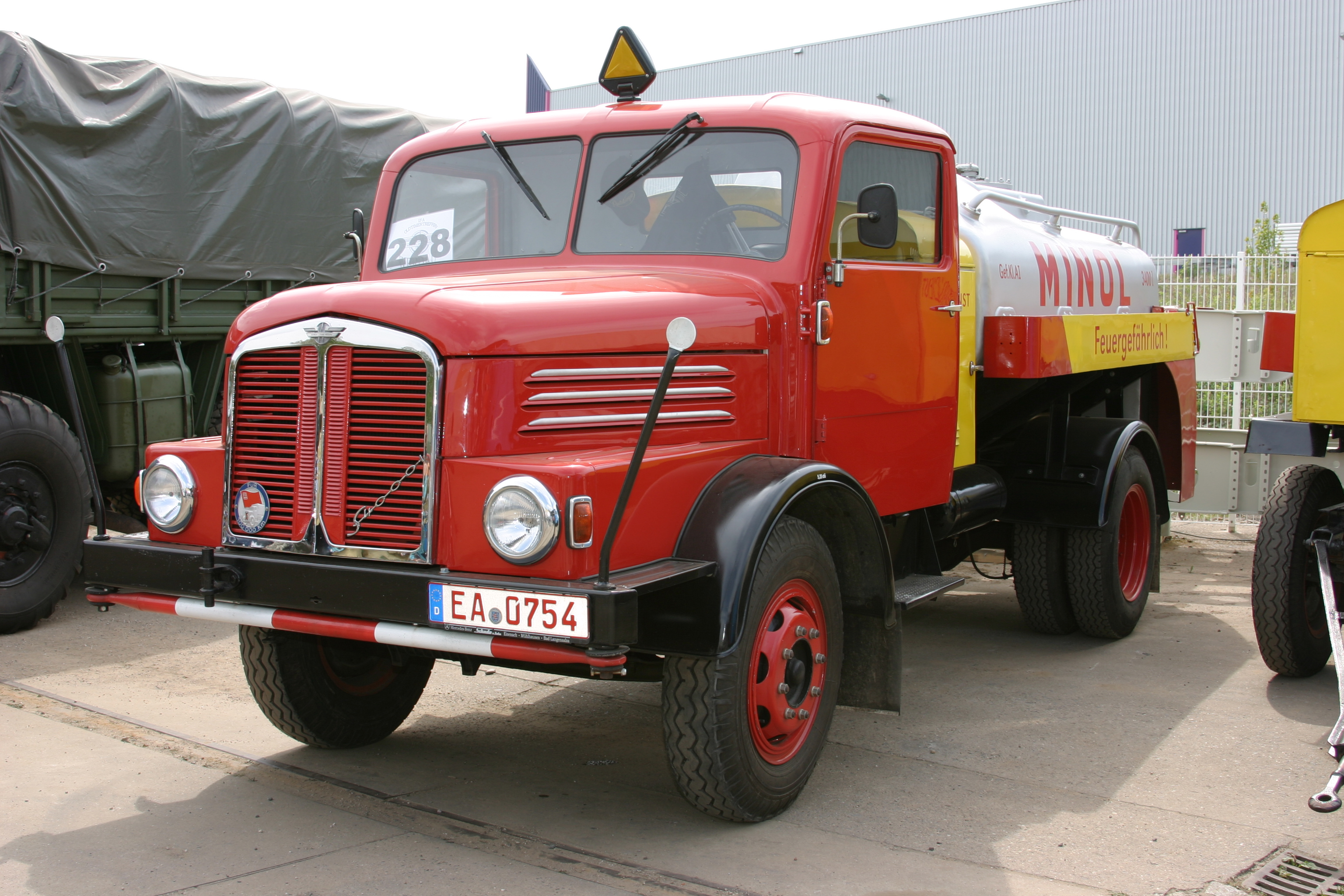 IFA S 4000-1 mit Tankaufbau beim 10. IFA-Oldtimertreffen im Ernst-Grube Werk Werdau/Sachsen